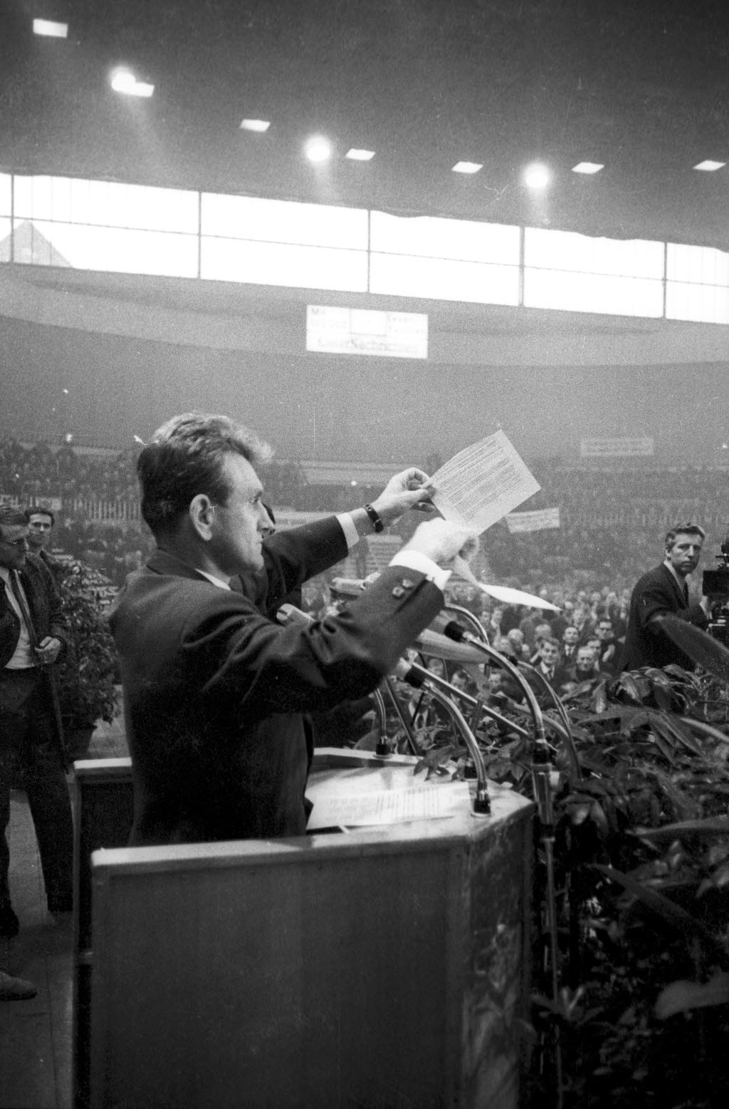 Der Vizepräsident der Europäischen Kommission, Dr. Sicco Mansholt, will seine Vorstellungen zur Agrarpolitik der Europäischen Wirtschaftsgemeinschaft (EWG), den sogenannten "Mansholt-Plan", mit den Landwirten diskutieren. Organisierte Störungen durch landwirtschaftliche Organisationen verhindern die Veranstaltung. Mansholts Diskussionspartner, Agrarpublizist Dr. Erich Geiersberger, versucht zu sprechen.